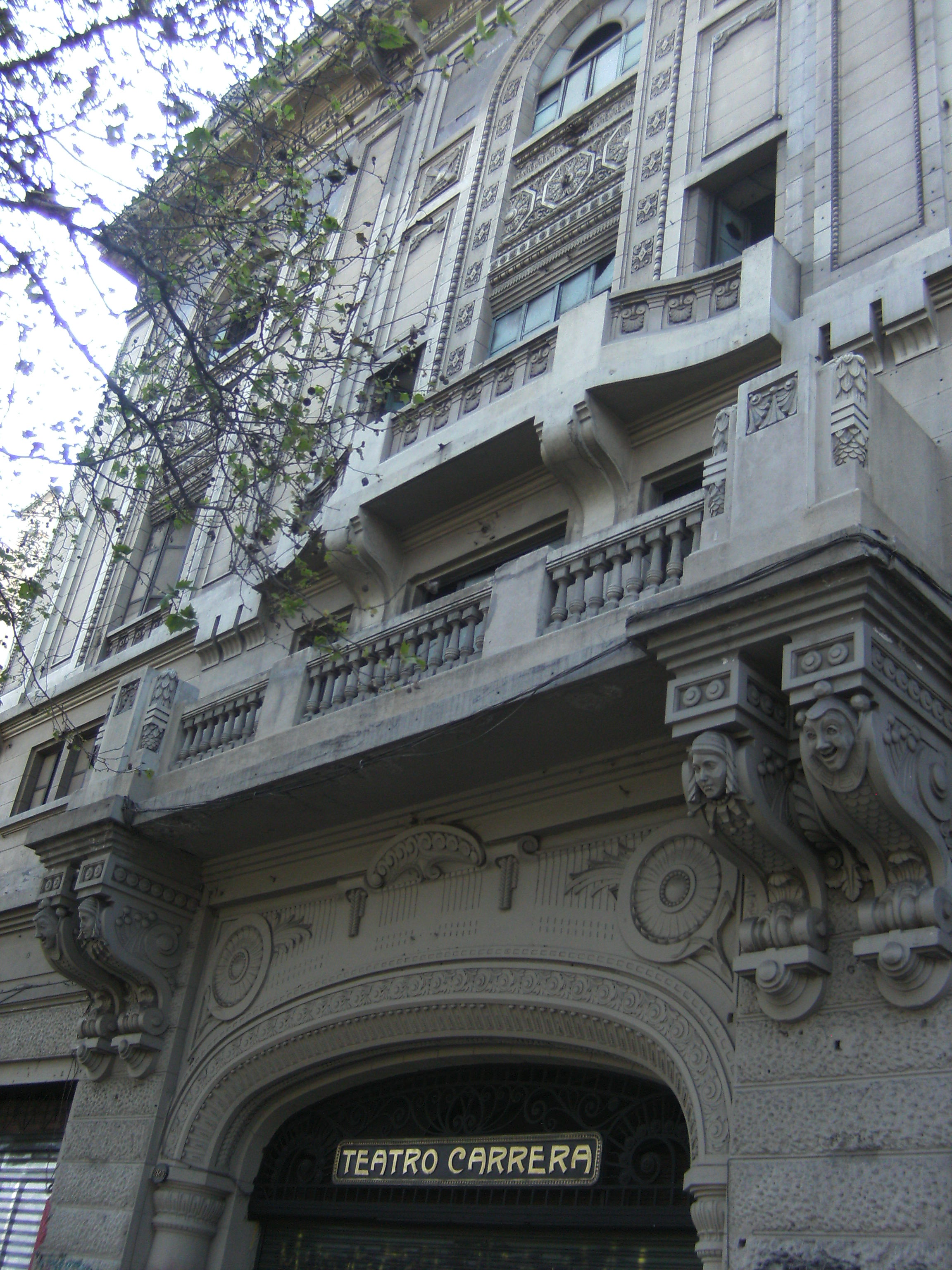 Sector calle Enrique concha y Toro en Santiago de Chile This is a photo of a national monument in Chile: 413